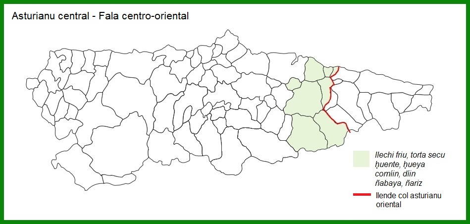 Asturianu central - Fala centro-oriental